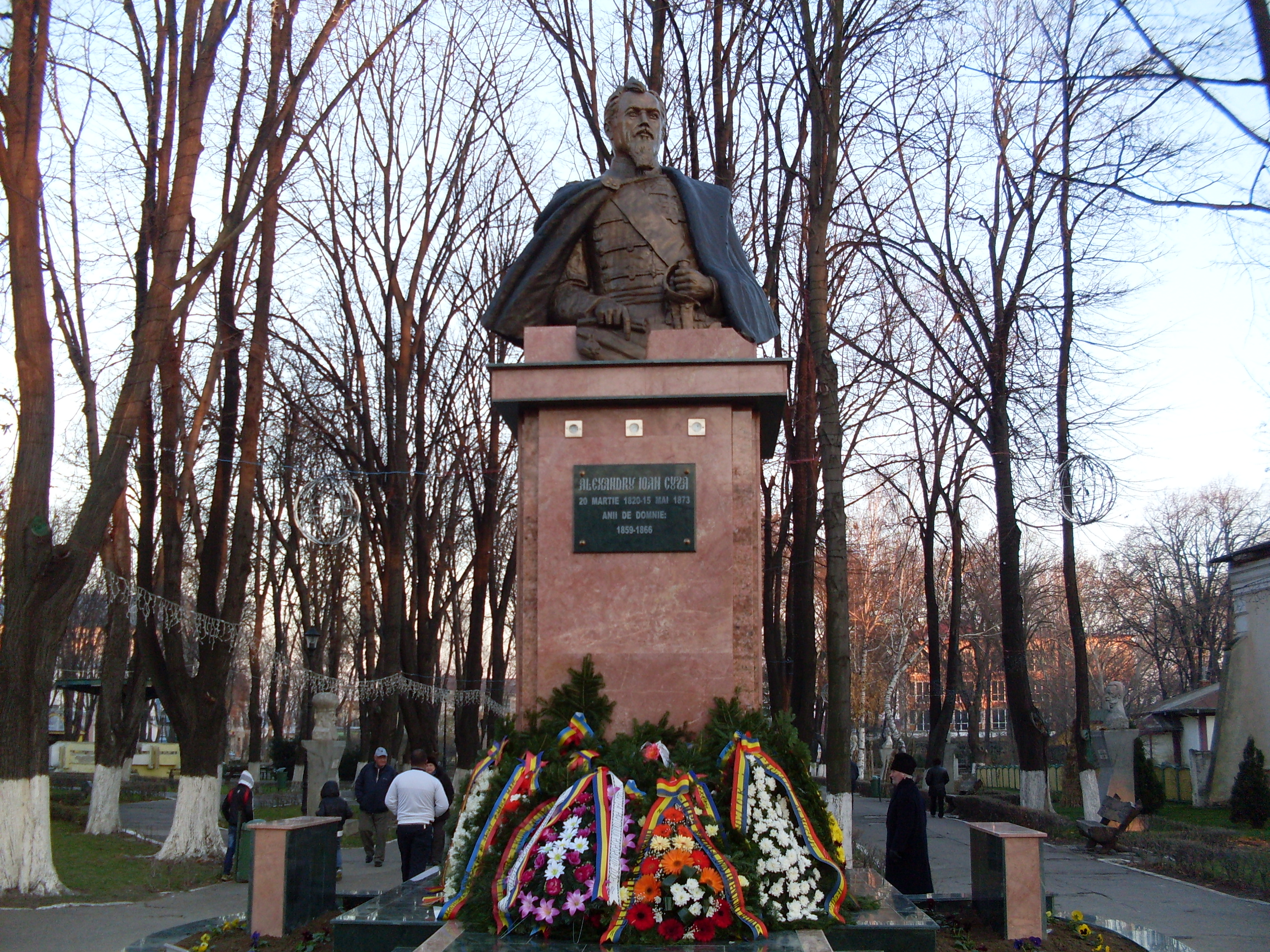 Bustul Domnitorului Alexandru Ioan Cuza